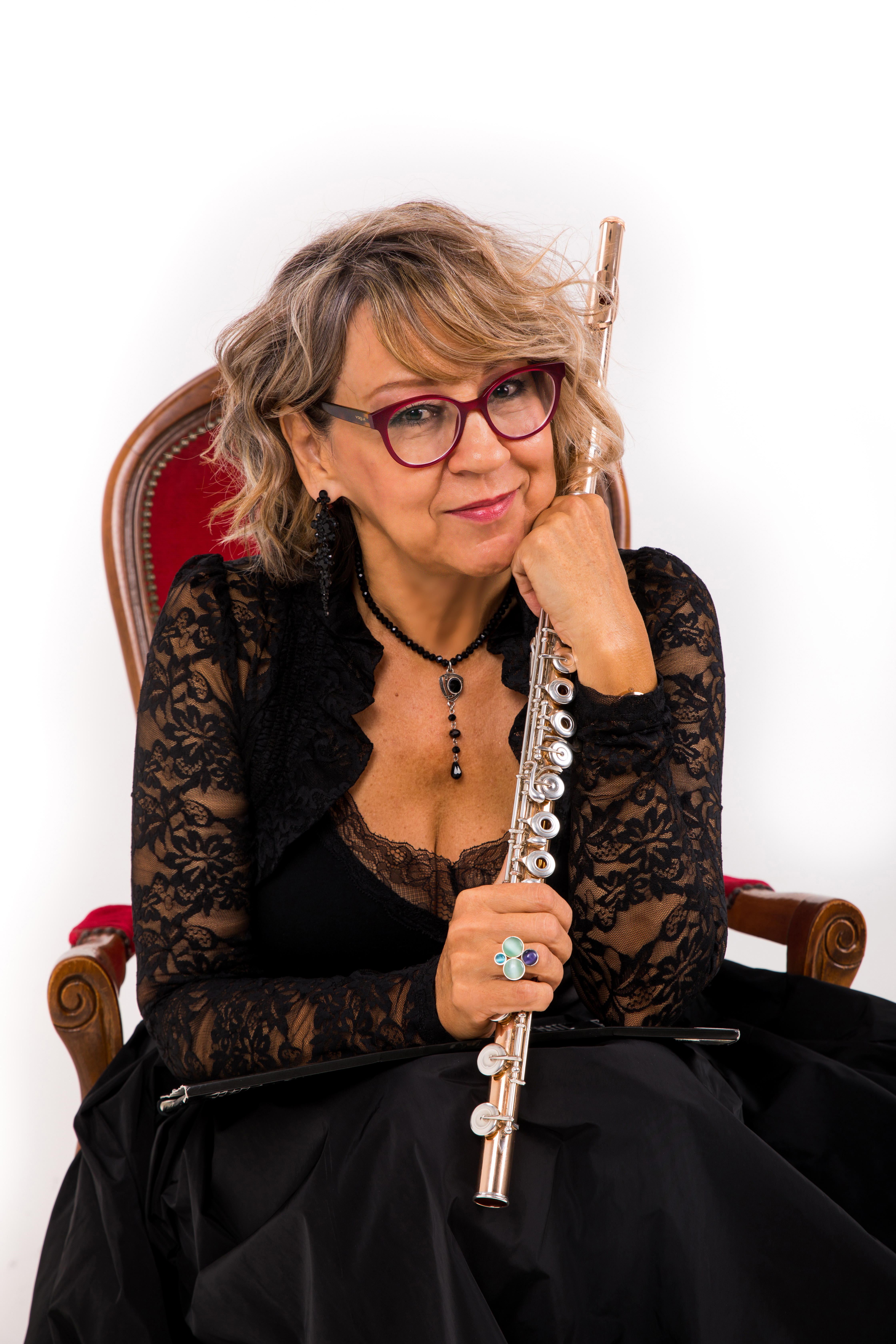 Novi Sads